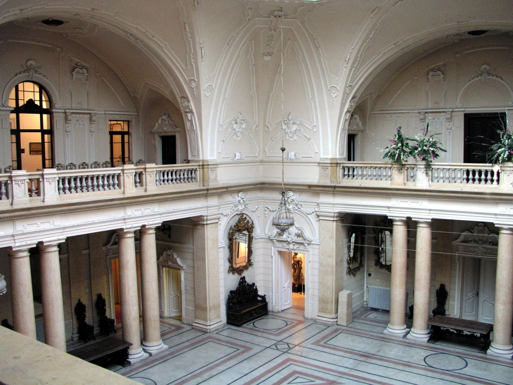 Unutrašnjost Pomorskog i povijesnog muzeja Hrvatskog primorja u Rijeci